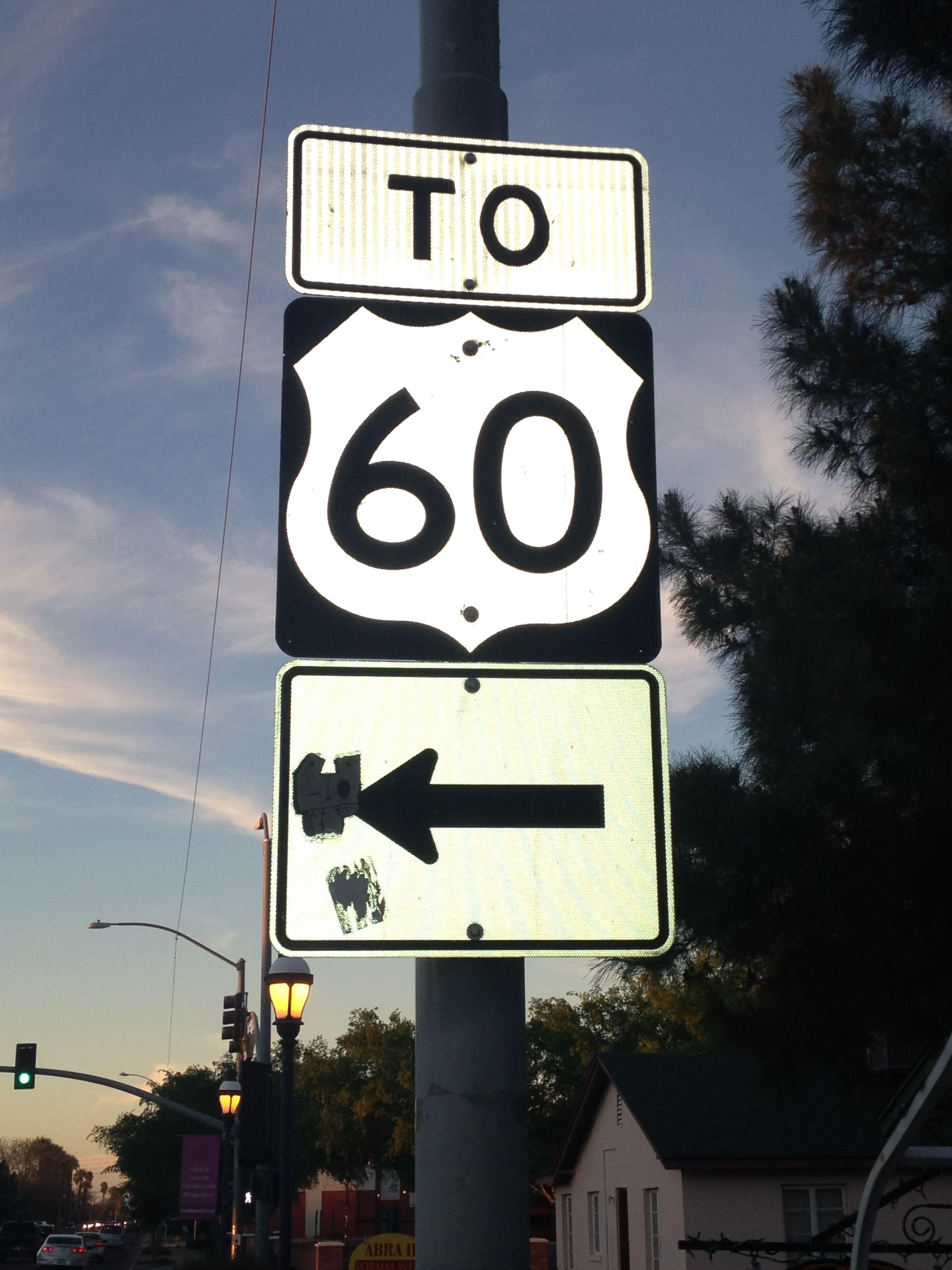 US 60 marker, Phoenix, AZ.